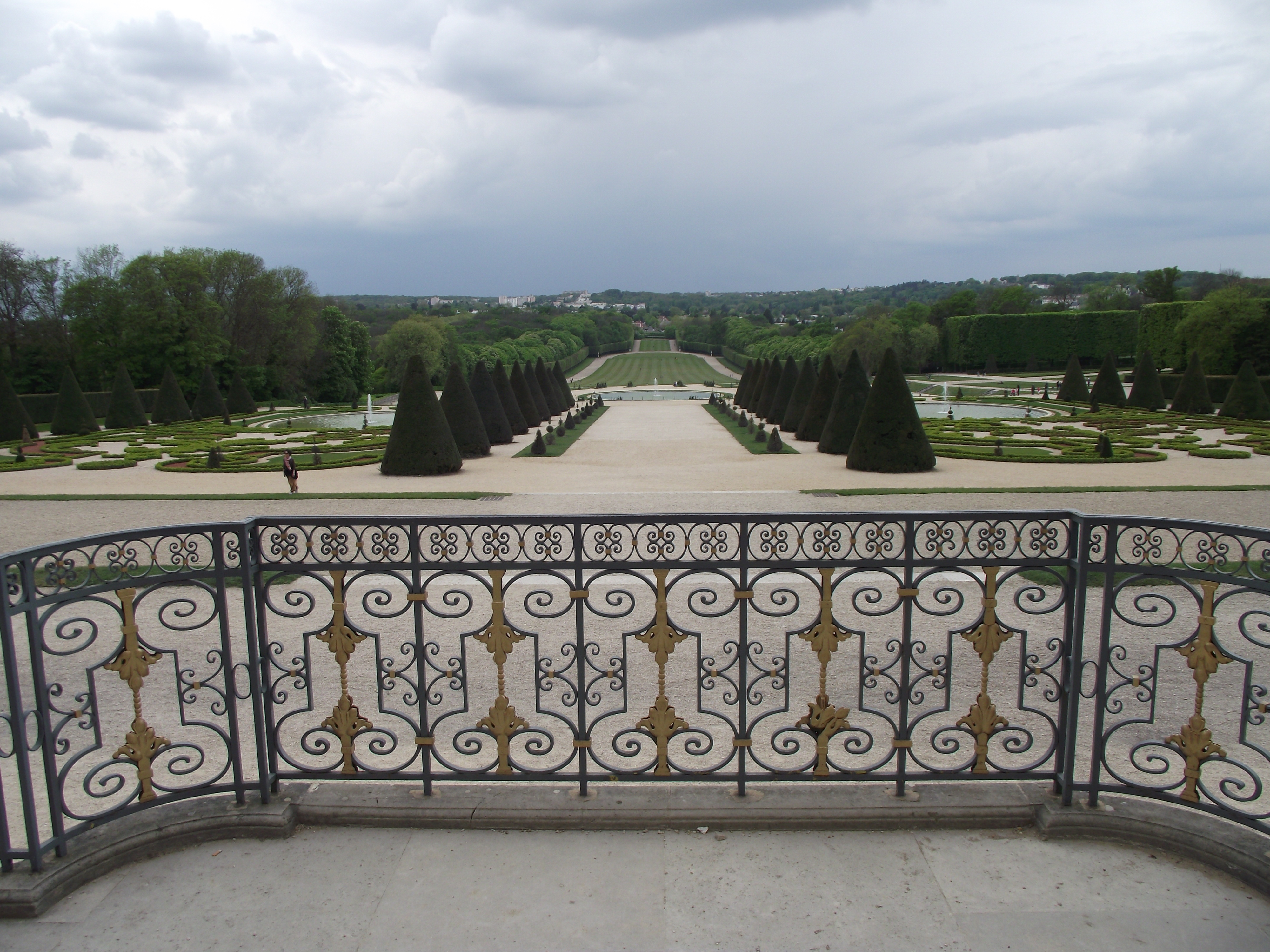 Château de Sceaux, XVII-XIX siècle